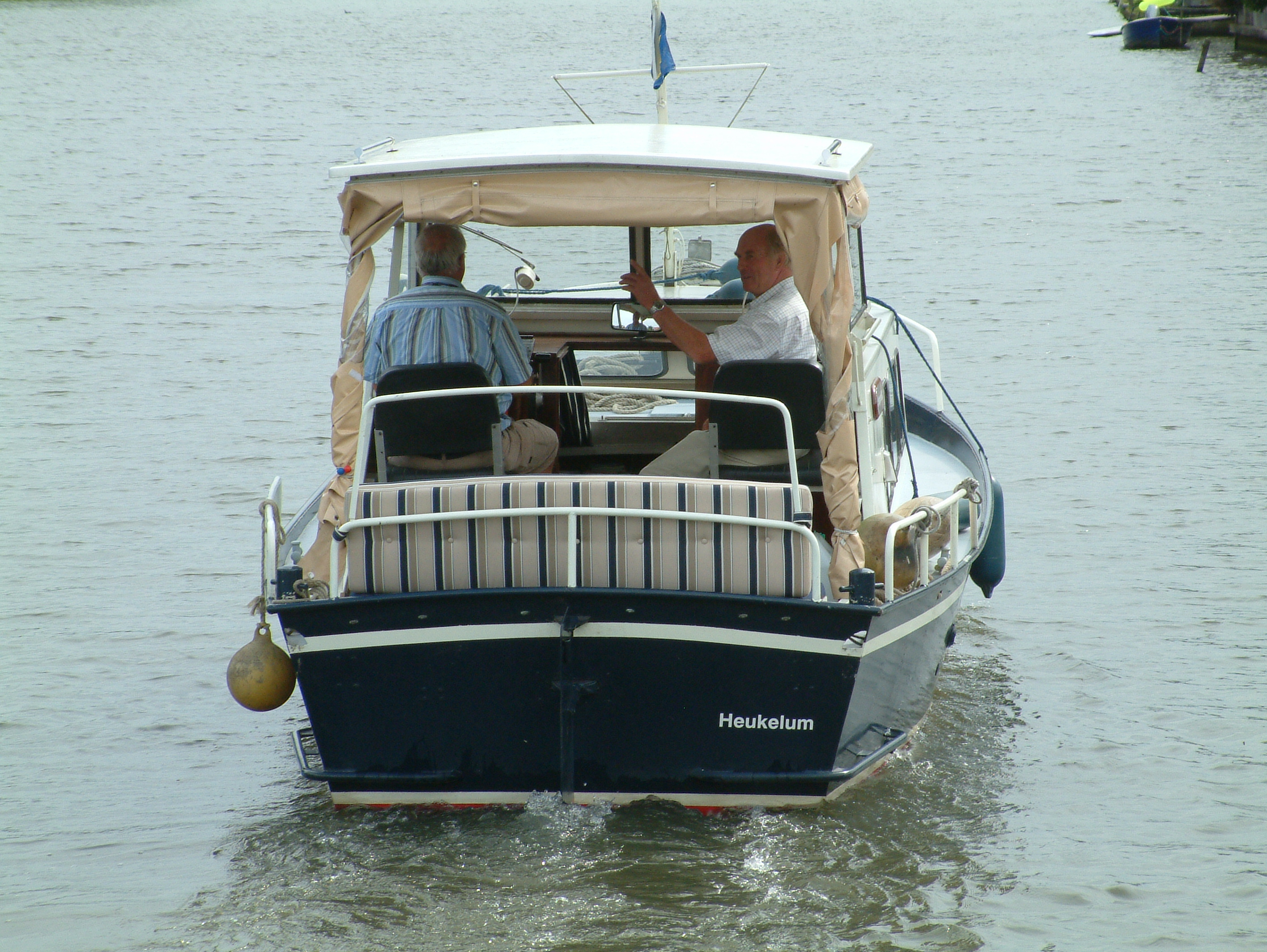 Doerak 700 op het Merwedekanaal in Meerkerk